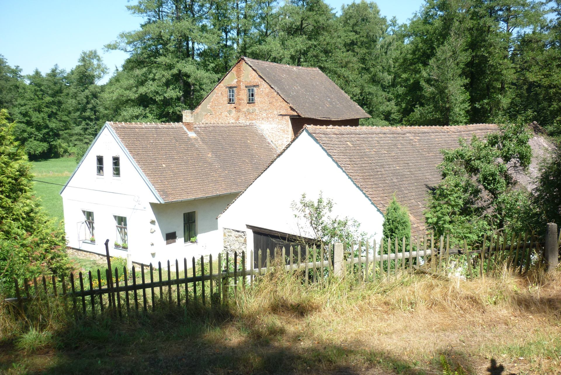 Procházkův mlýn ve Slaviboři